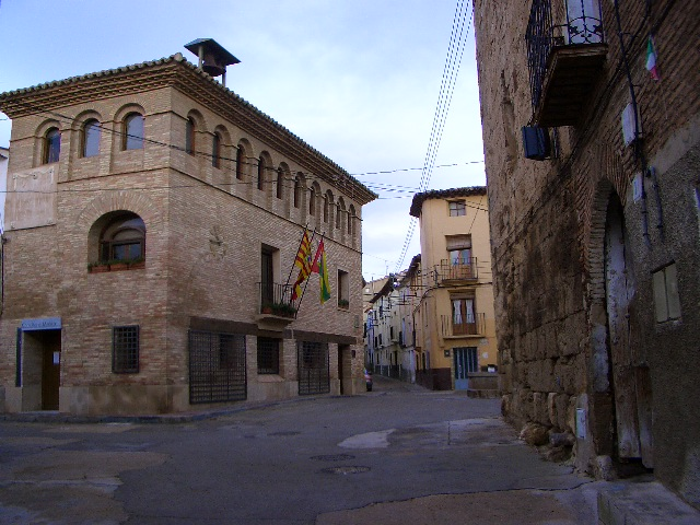 Ayuntamiento de Bulbuente (Zaragoza) España.